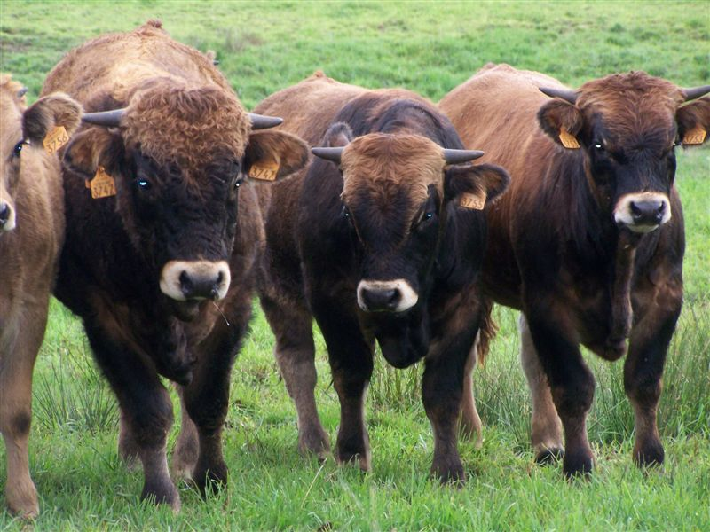 Jeunes taureaux de l'Aubrac